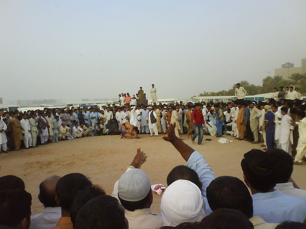 Kushti/pehlwani (wrestling) in Pakistan.